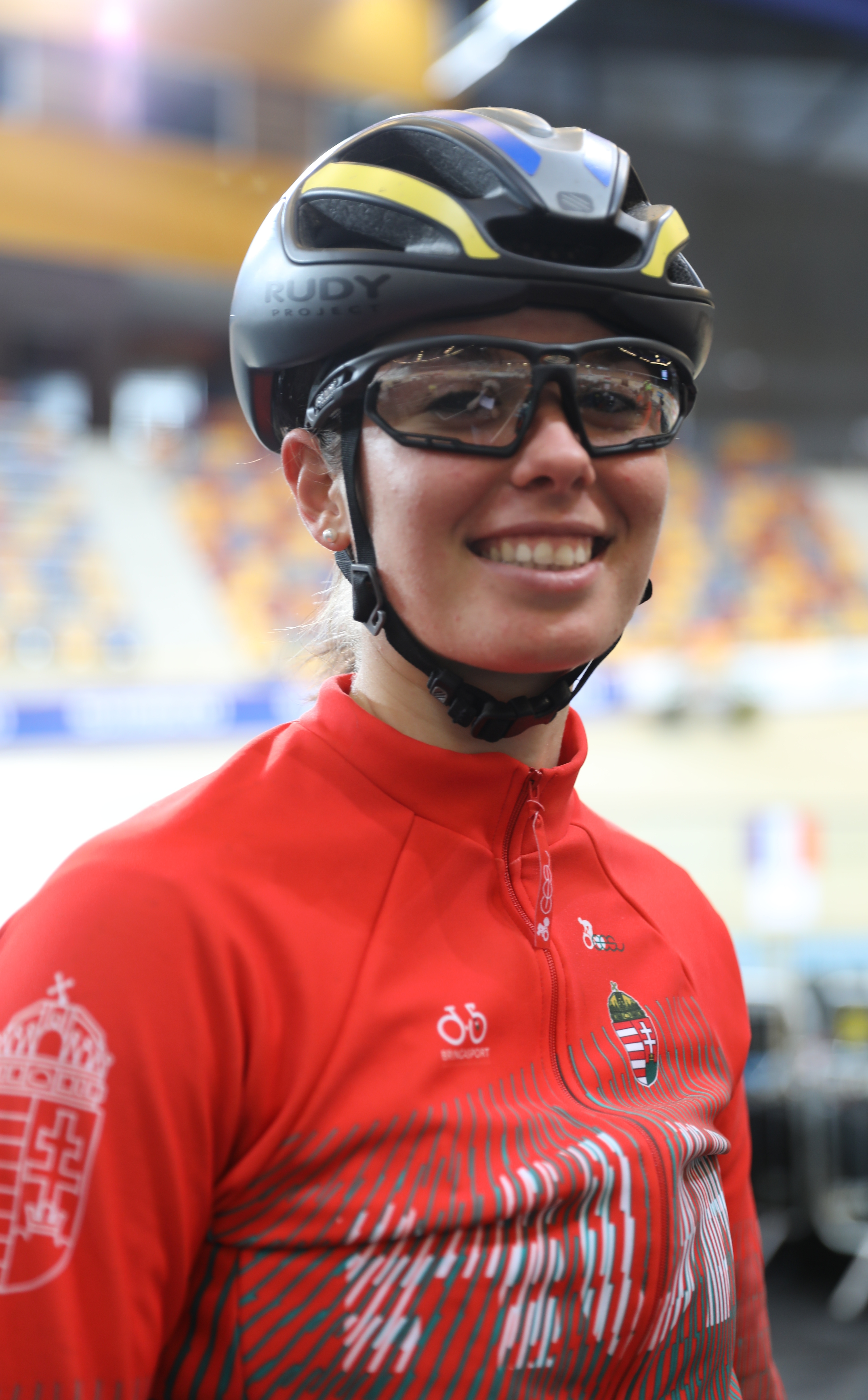 Johanna Kitti Borissza, Radsportlerin aus Ungarn